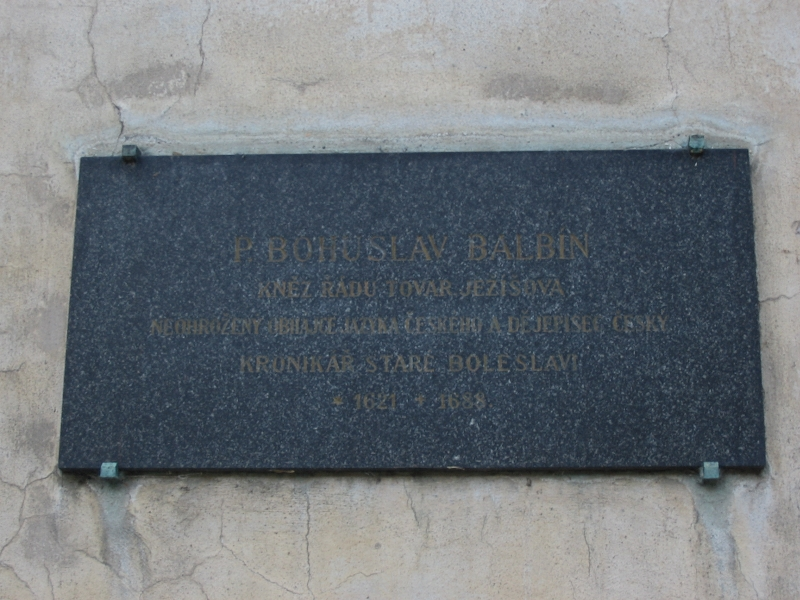 Pametni deska na Bohuslava Balbina na bazilice Sv. Vaclava ve Stare Boleslavi